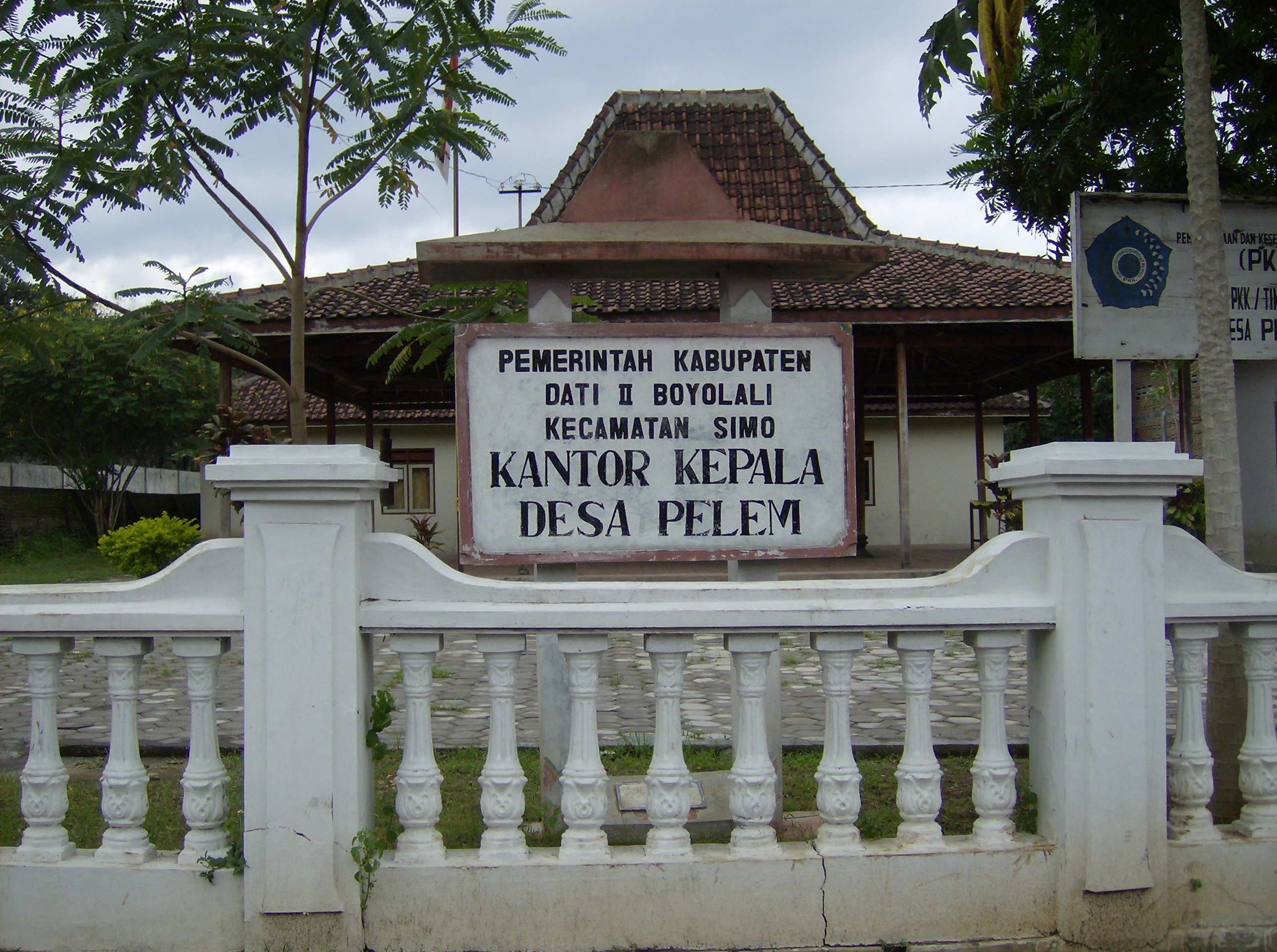 Made by Meursault2004 aka Revo Arka Giri Soekatno